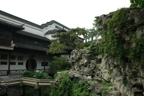 æ è¿°æ‘˜è¦ }